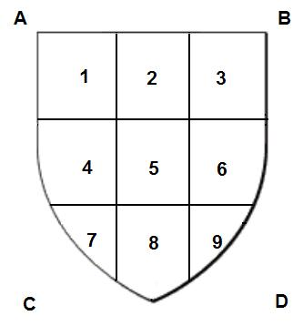 Pajzsrészek